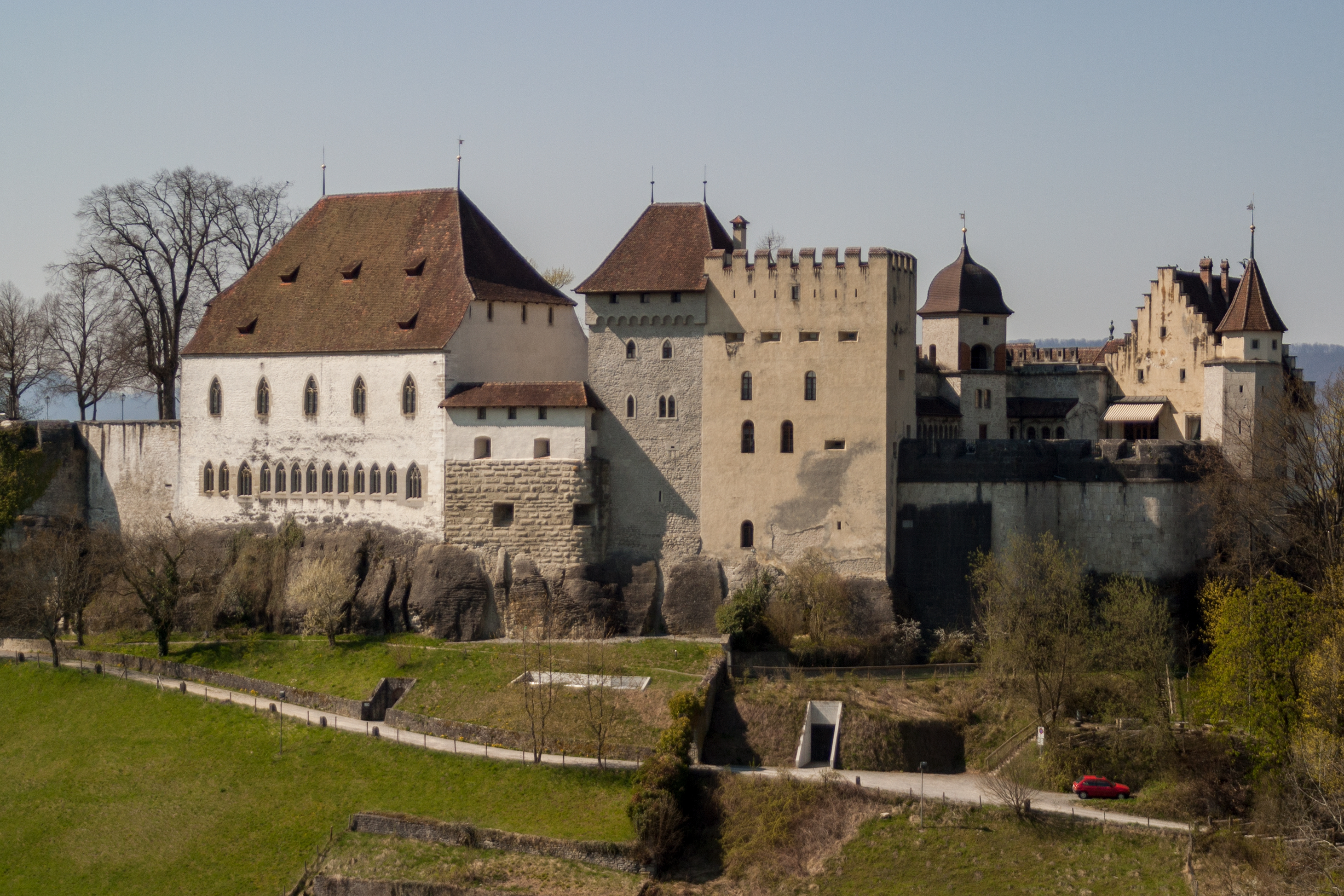 Schloss Lenzburg in Lenzburg (AG)